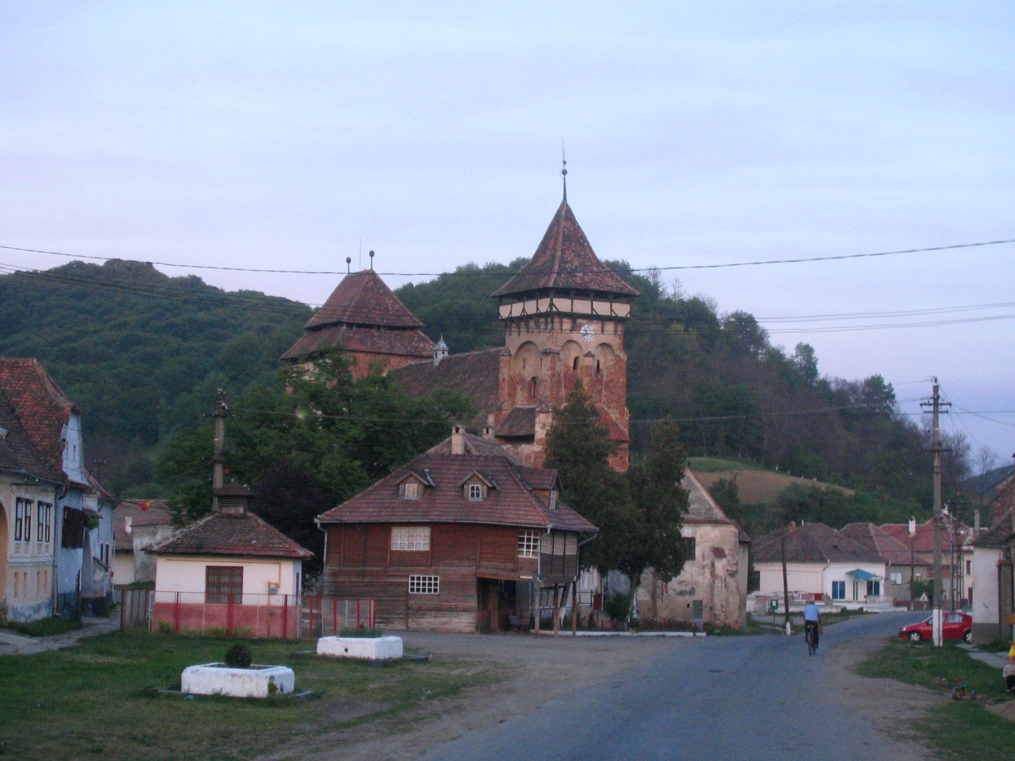 Centrul satului Valea Viilor, judetul Sibiu. In prim-plan biserica fortificata.